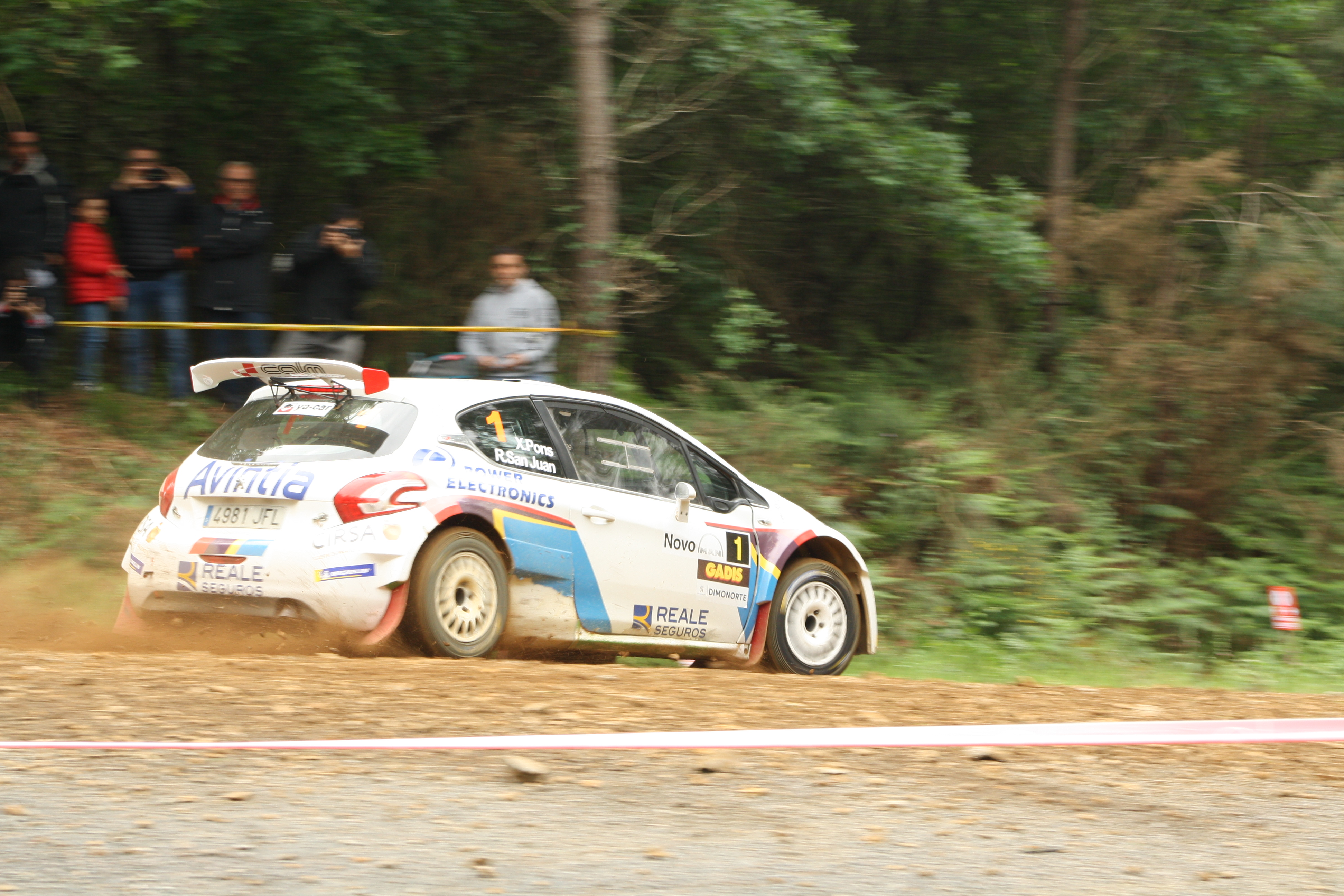 Rally Terra da Auga. Tercera prueba del campeonato de España de rallies de tierra 2018.